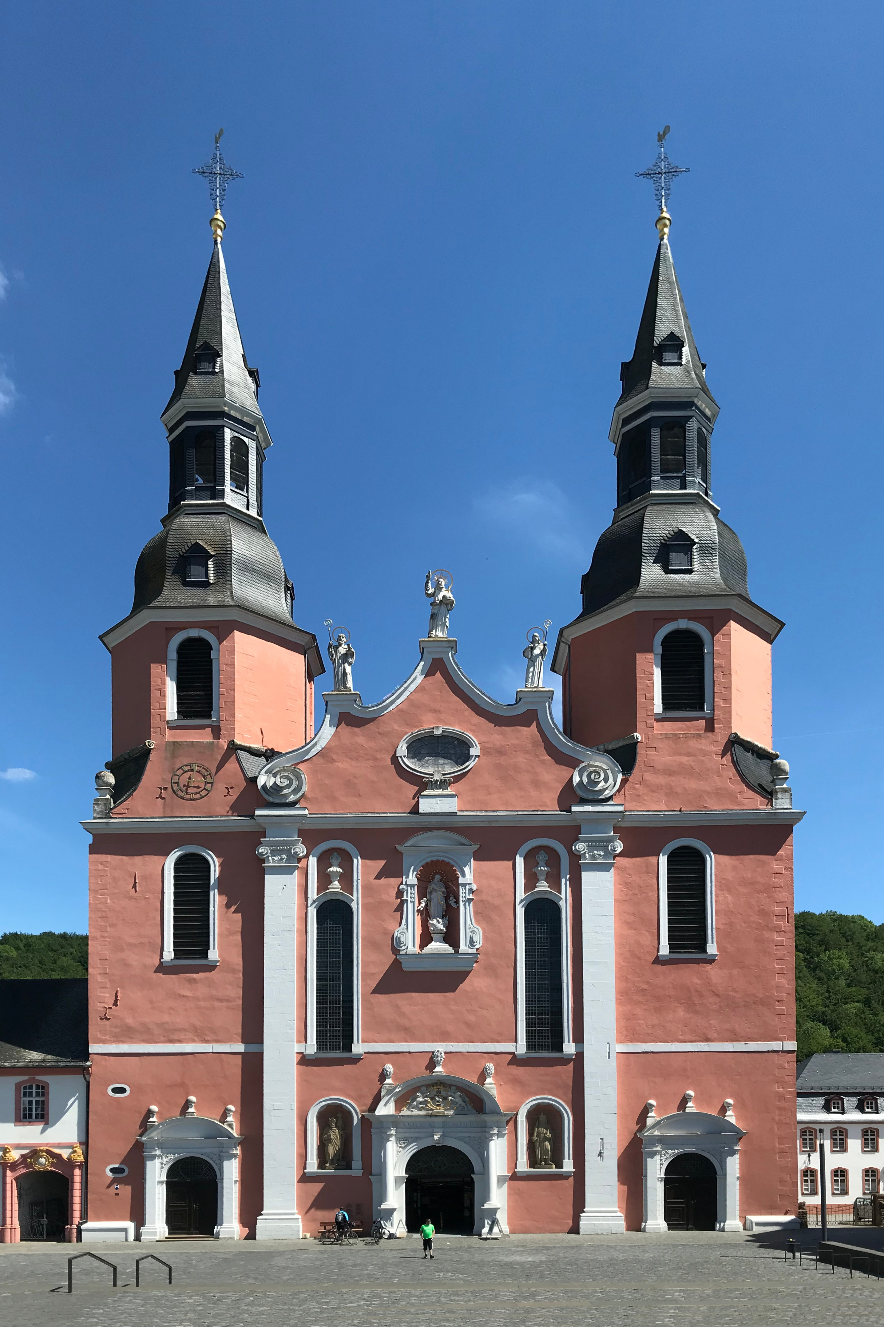 Prüm Abbey